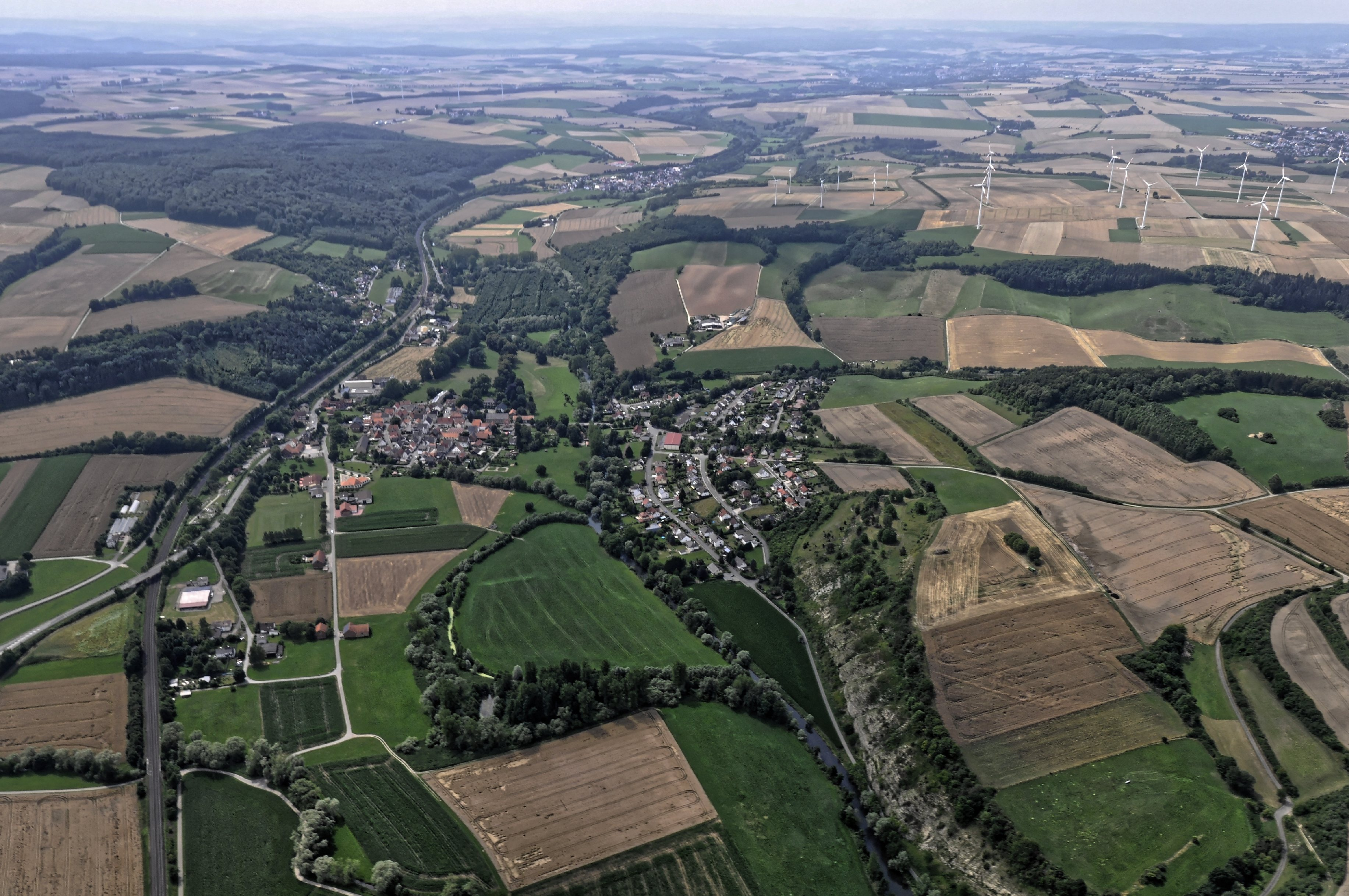 Bilder vom Flug NordholzHammelburg 2015: Liebenau